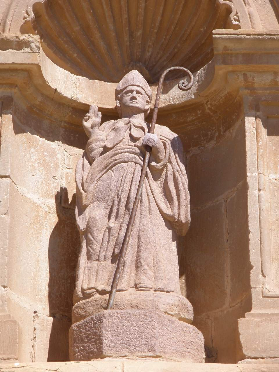 Lardero - Basílica de San Marcia